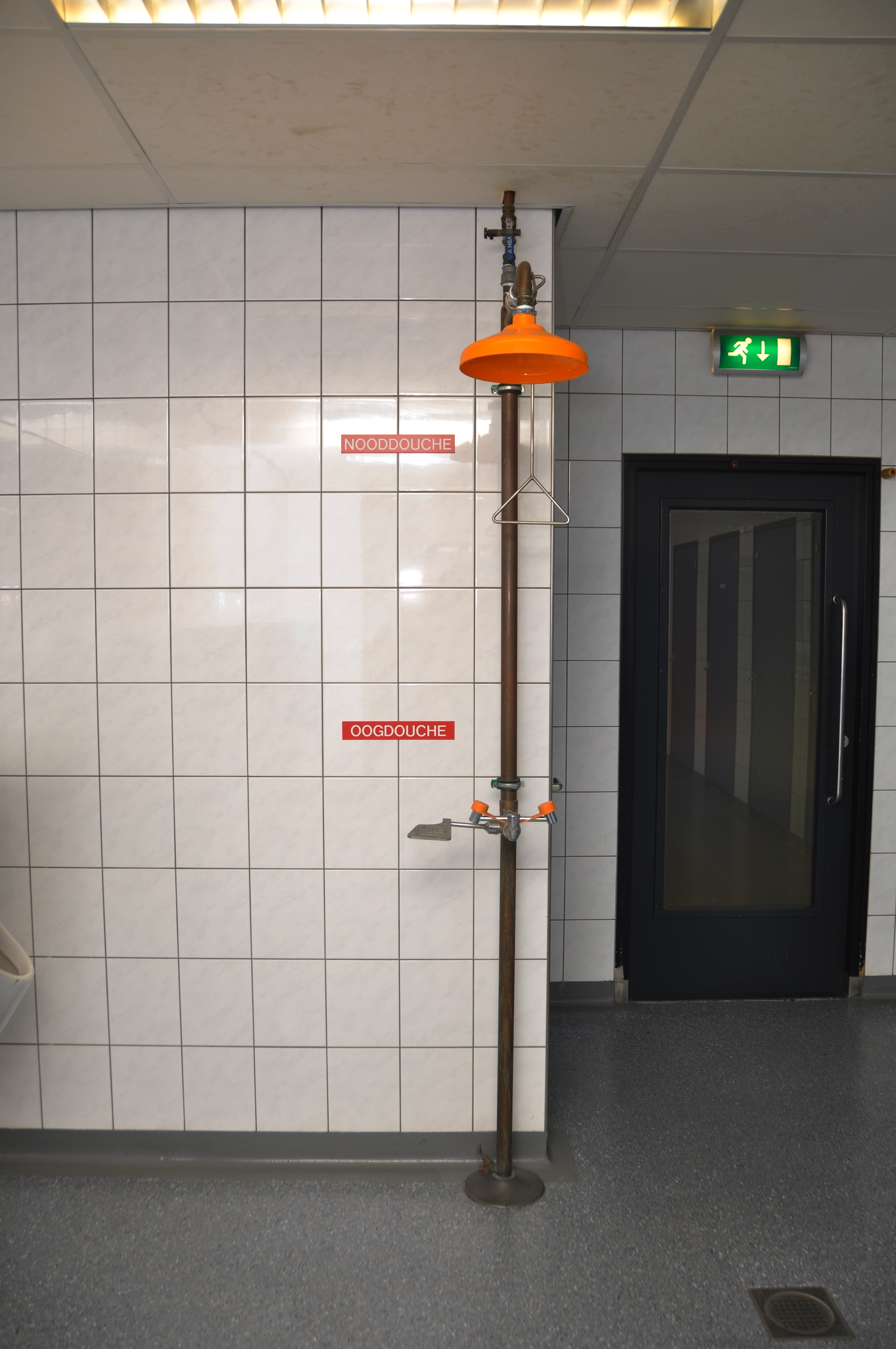 De open dag van Damen Gorinchem op 09-11-2013.